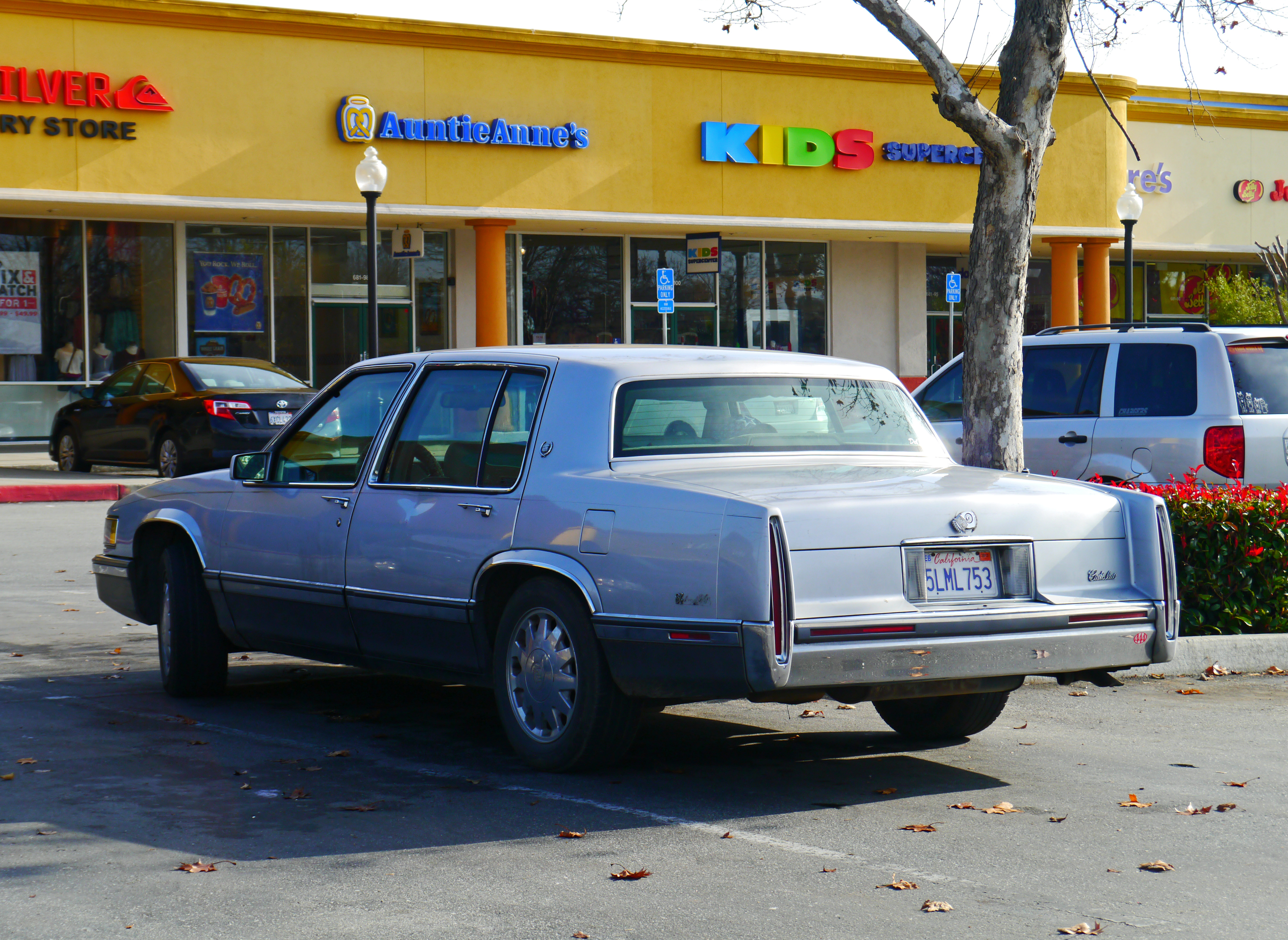 1992 Cadillac Sedan de Ville.